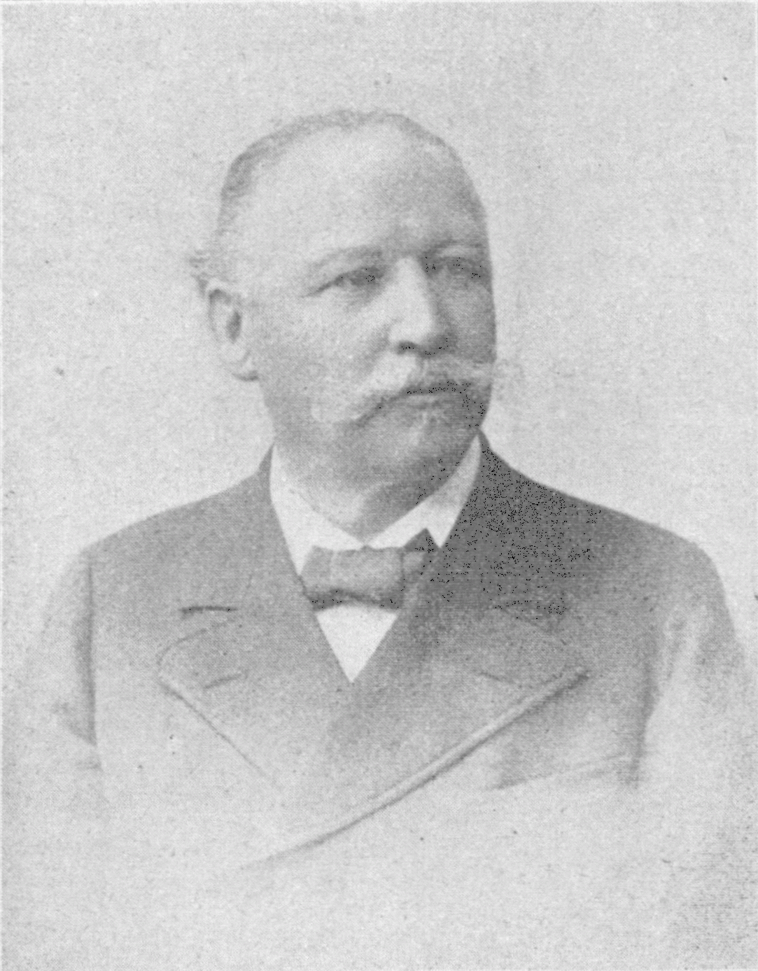 Leo Arnoldi (1843 Arnsberg, Westphalia — 4 May 1898 Vienna)[1], German engineer and entrepreneur